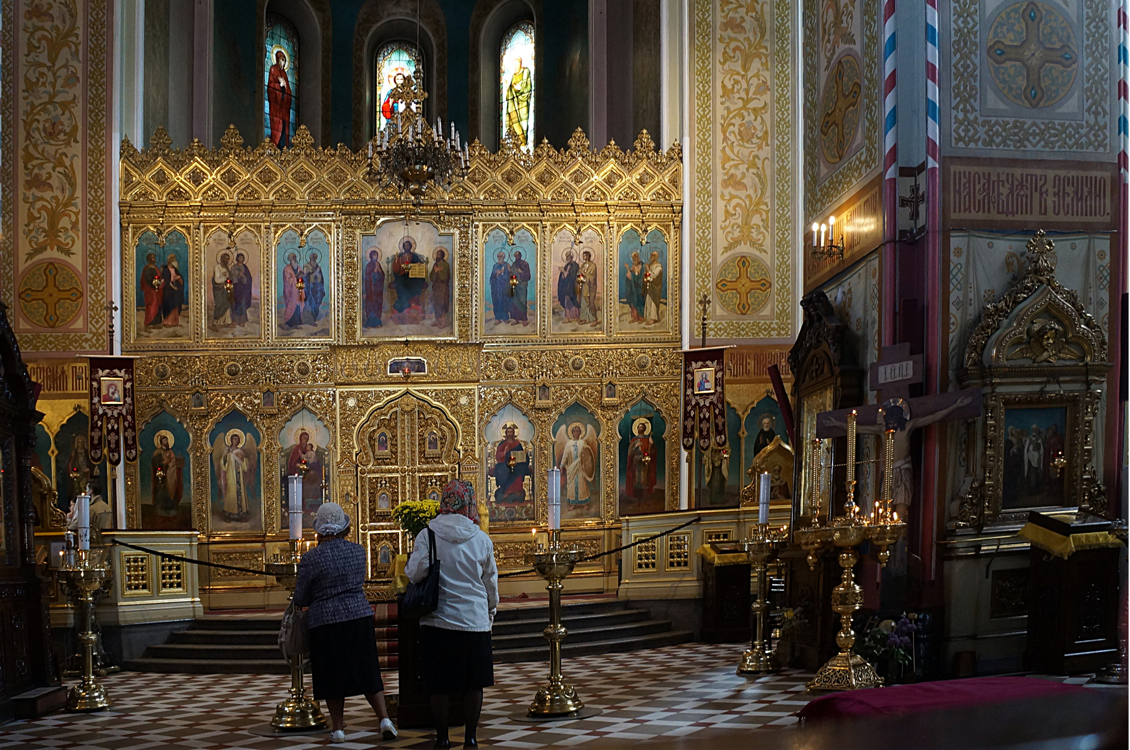 La Cathedral Alexander Nevsky à Tallinn, Estonie. Object location59° 26′ 08.89″ N, 24° 44′ 21.85″ E